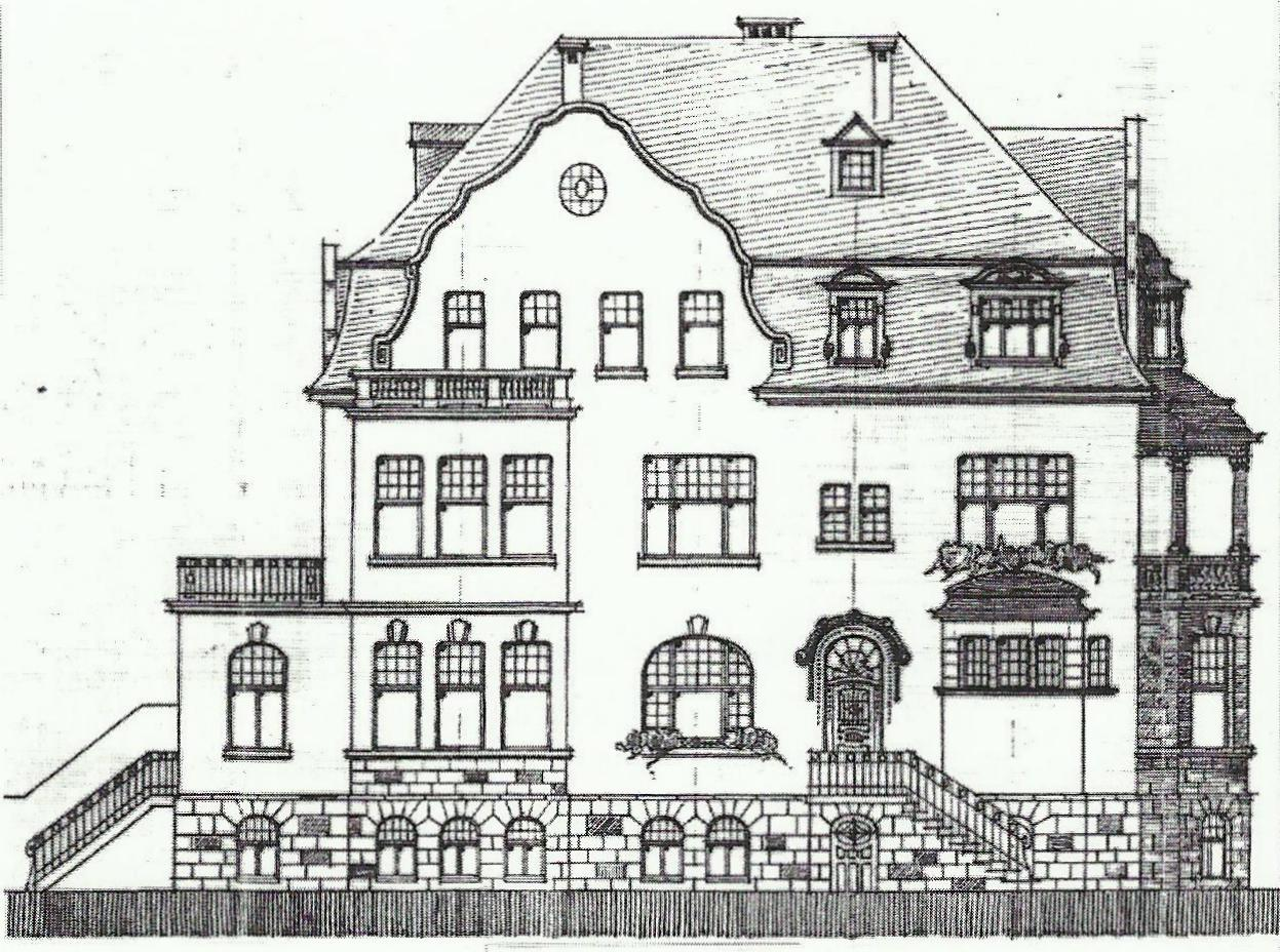 Halbvilla Keller/Kramer (spätere Landesvertretung der Freien und Hansestadt Hamburg) in Bonn: Bauzeichnung, Aufriss der Seitenansicht